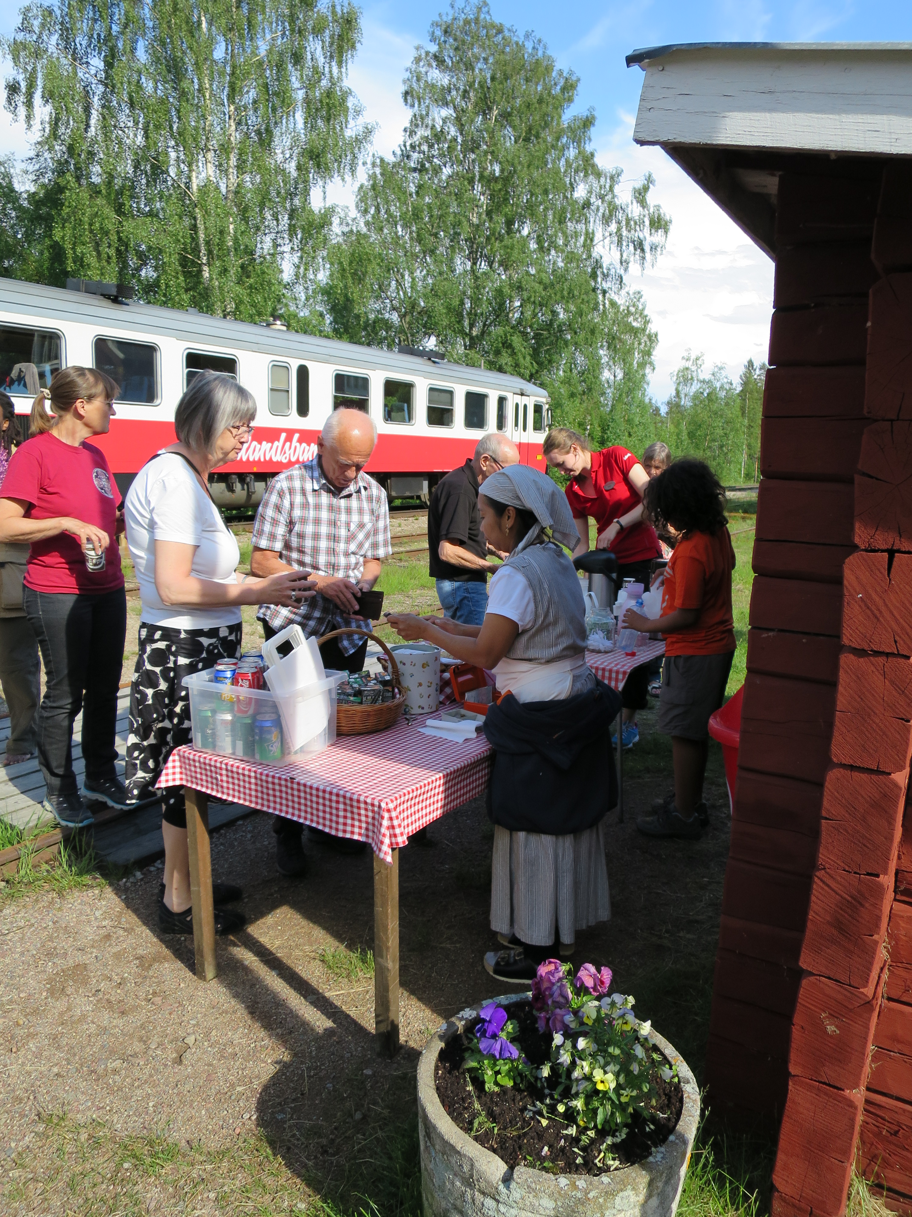 Break at Fågelsjö Station